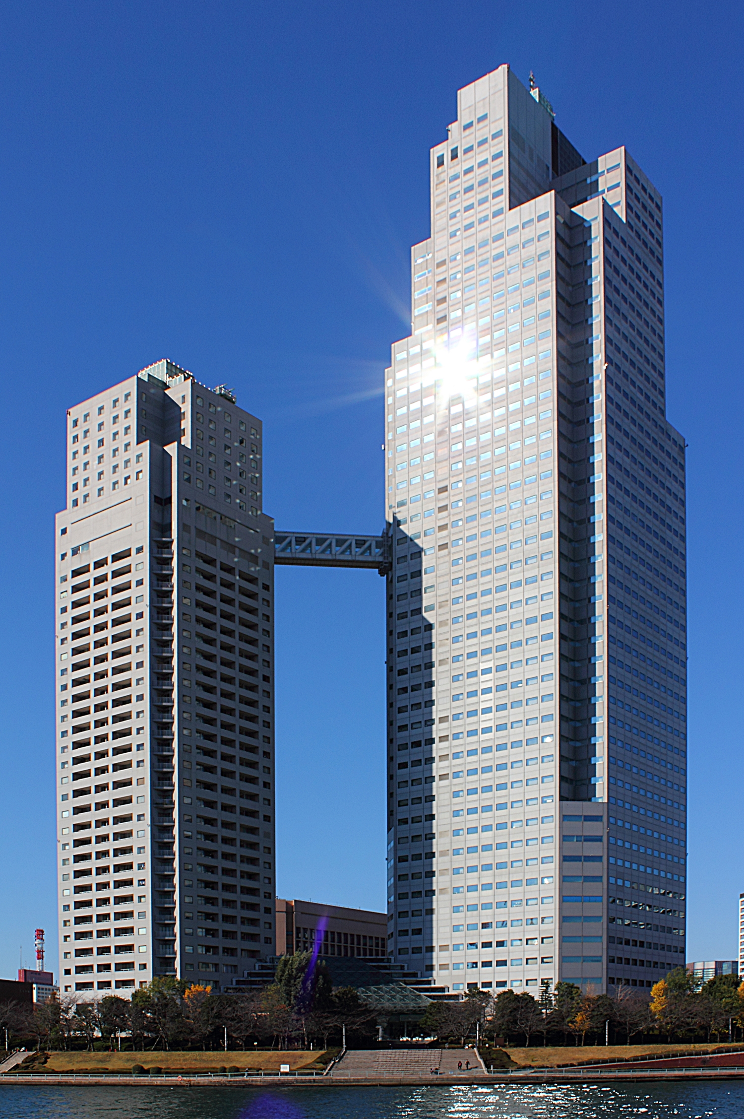 聖路加タワー（東京都中央区）